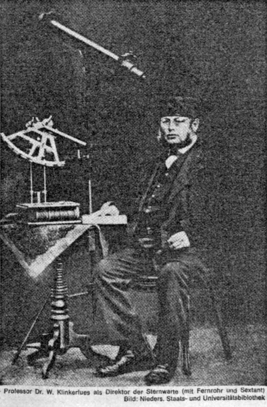 Wilhelm Klinkerfues als Direktor der Sternwarte Göttingen, ab 1868.